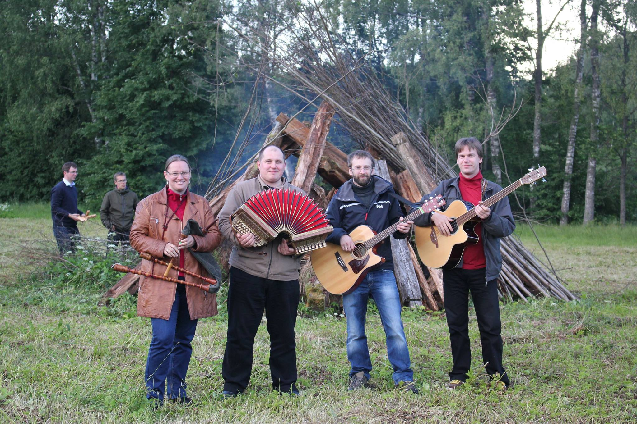 Ansambel Kratt 2014. aastal